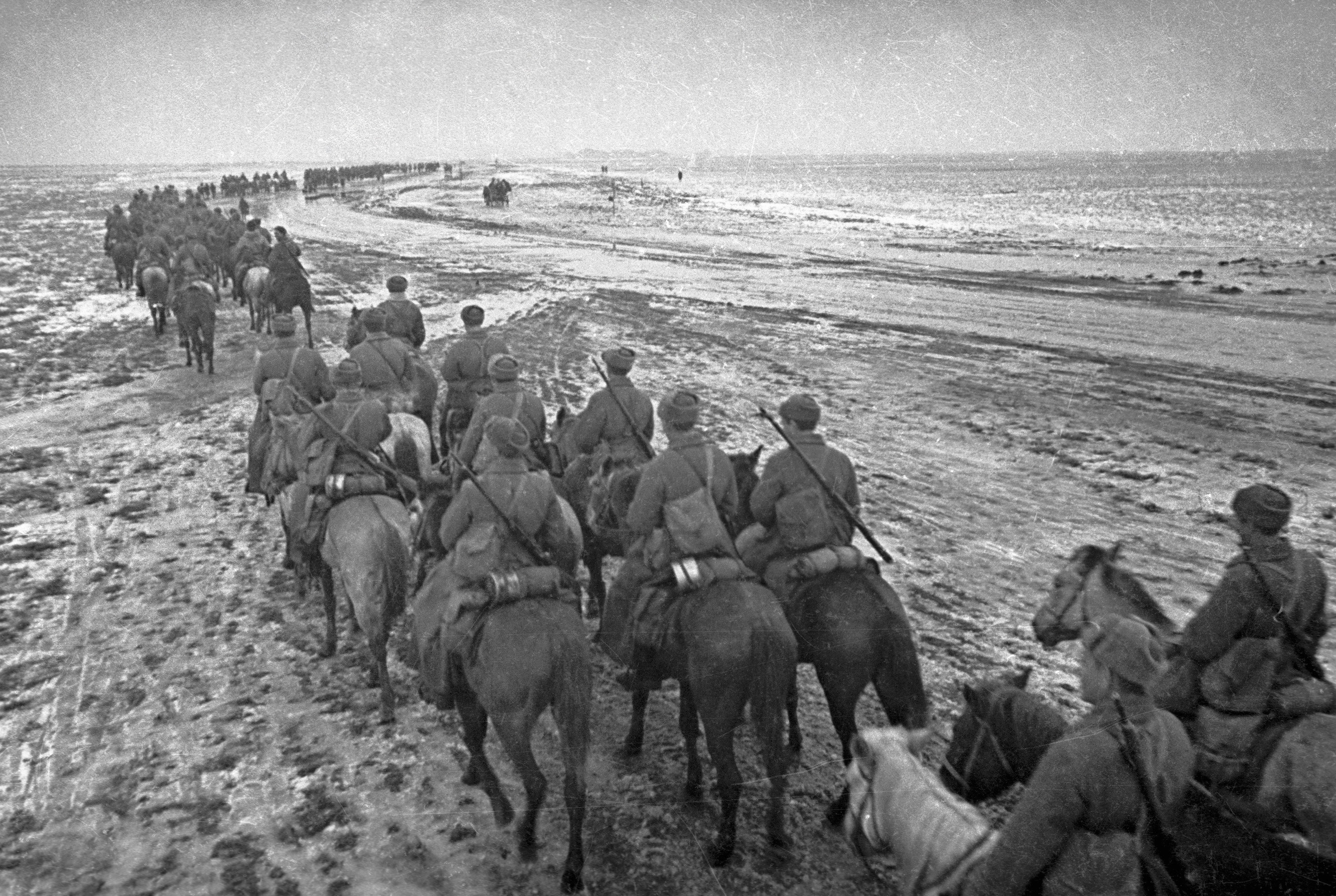 3-й Украинский фронт. Одесская операция. Части 4-го гвардейского кавалерийского корпуса на марше